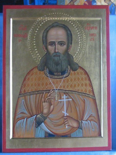 Священномученик Николай Михайлович Гашев. Сделано Ильинско-Строгановской Мастерской